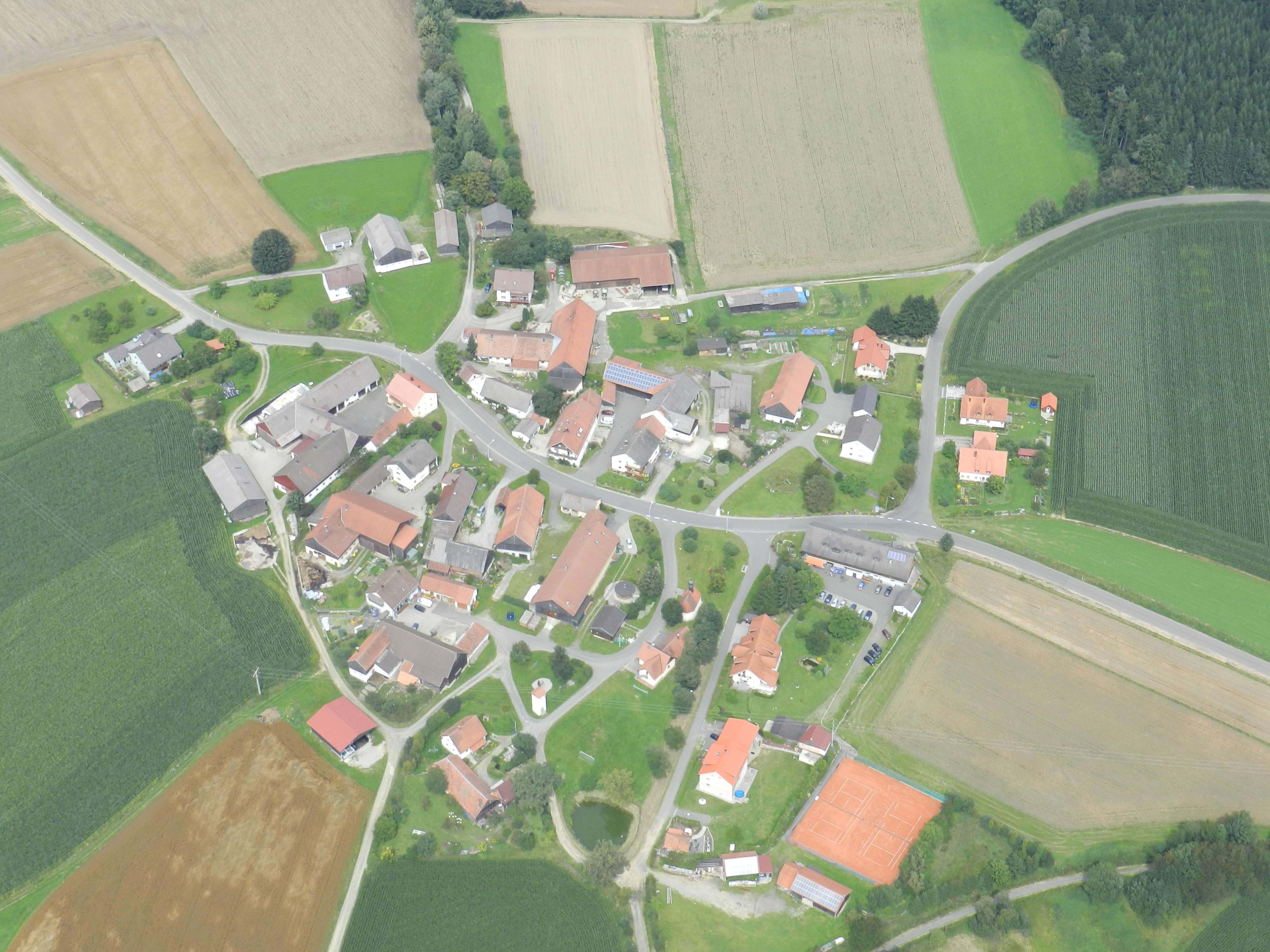 Lind, Ortsteil der Stadt Oberviechtach, Landkreis Schwandorf, Oberpfalz, Bayern (2011)